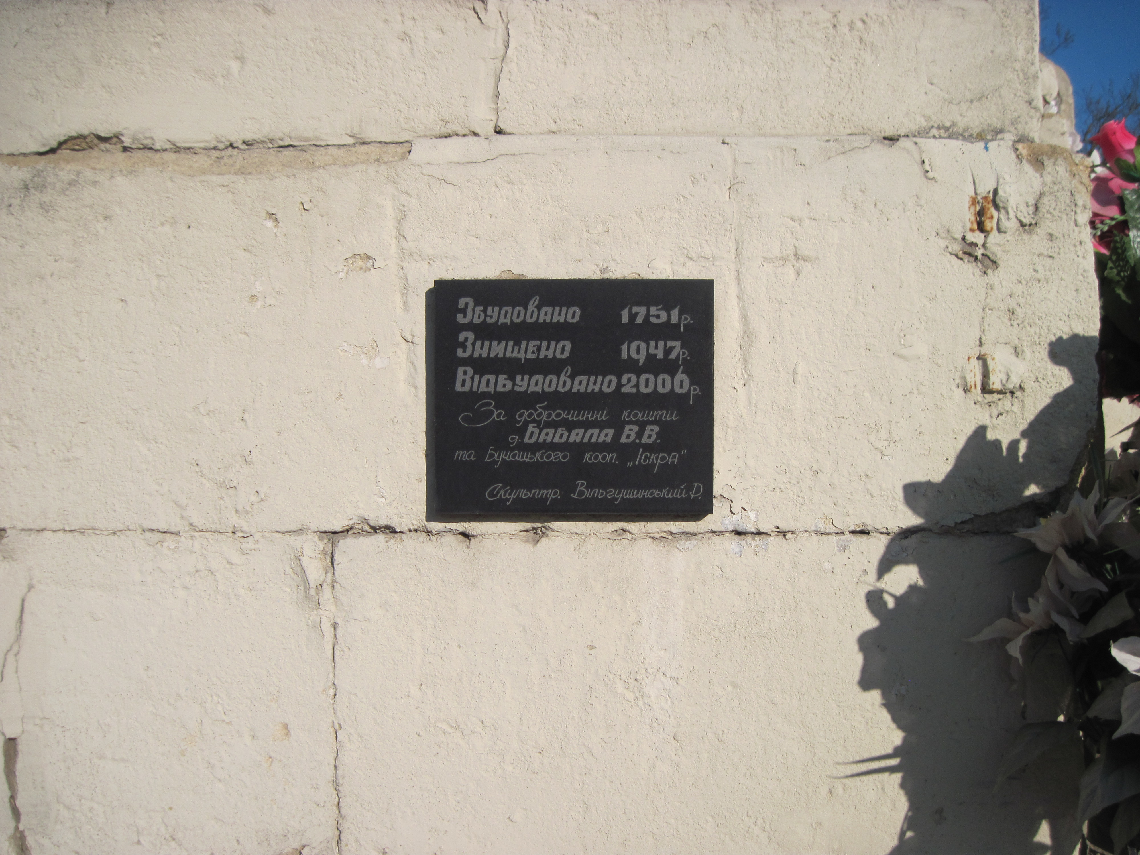 Статуя ПДМ, Бучач, 2015